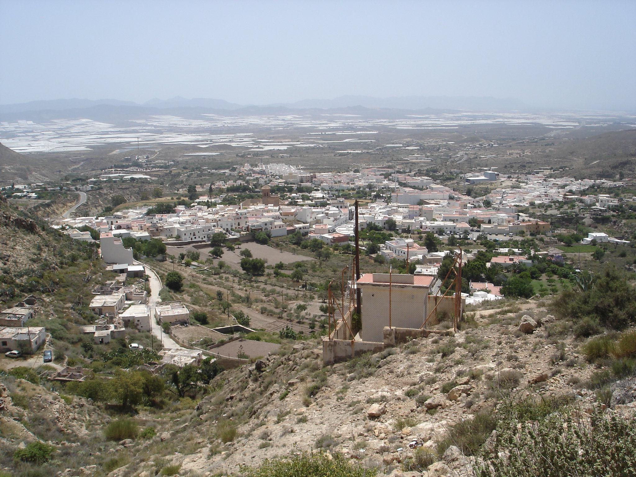 Ville de Nijar (Province d'Alméria) avec au fond une vue des serres recouvertes de plastique. Auteur : Jean-Claude Perez